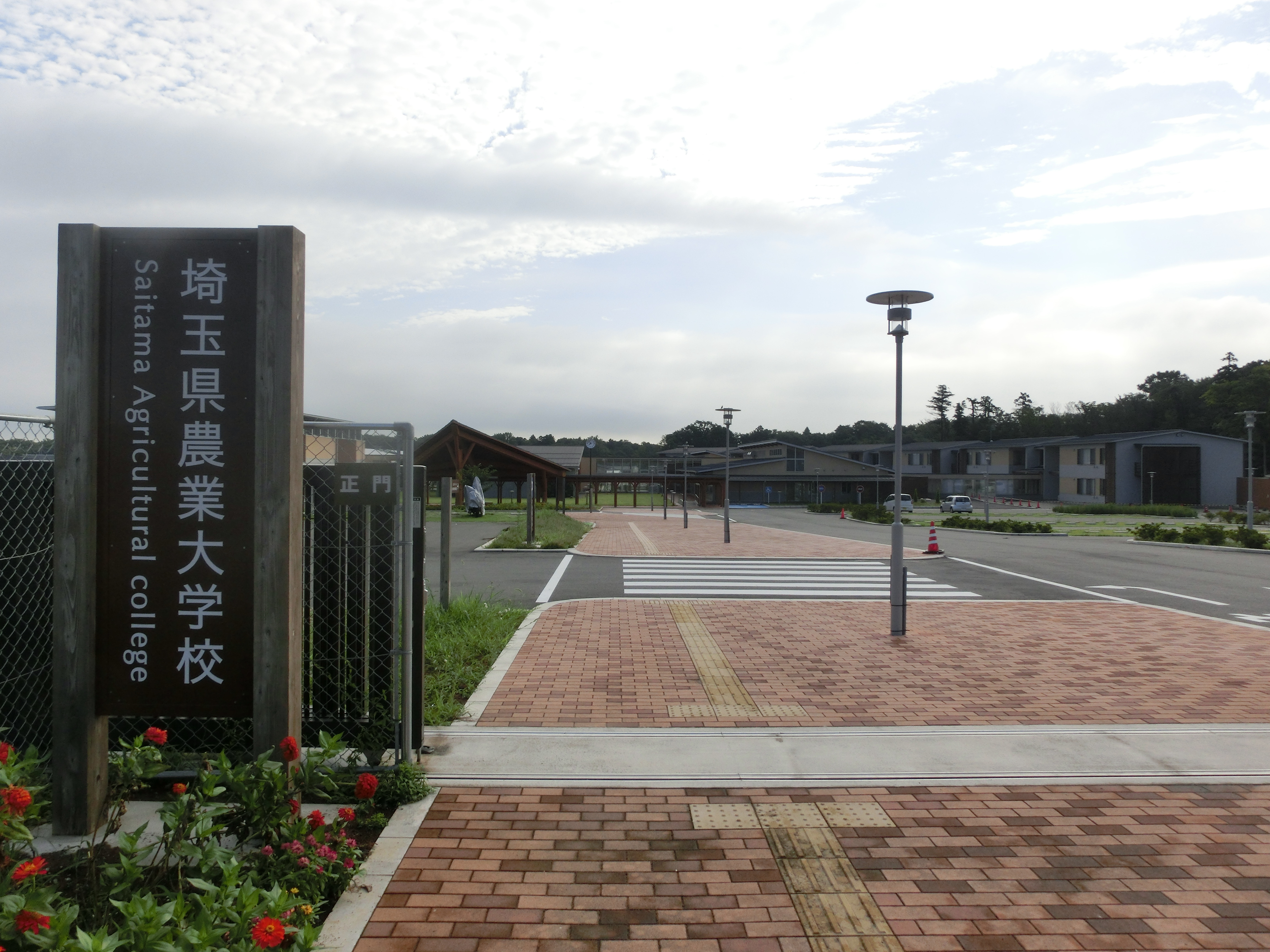 埼玉県農業大学校校門から撮影